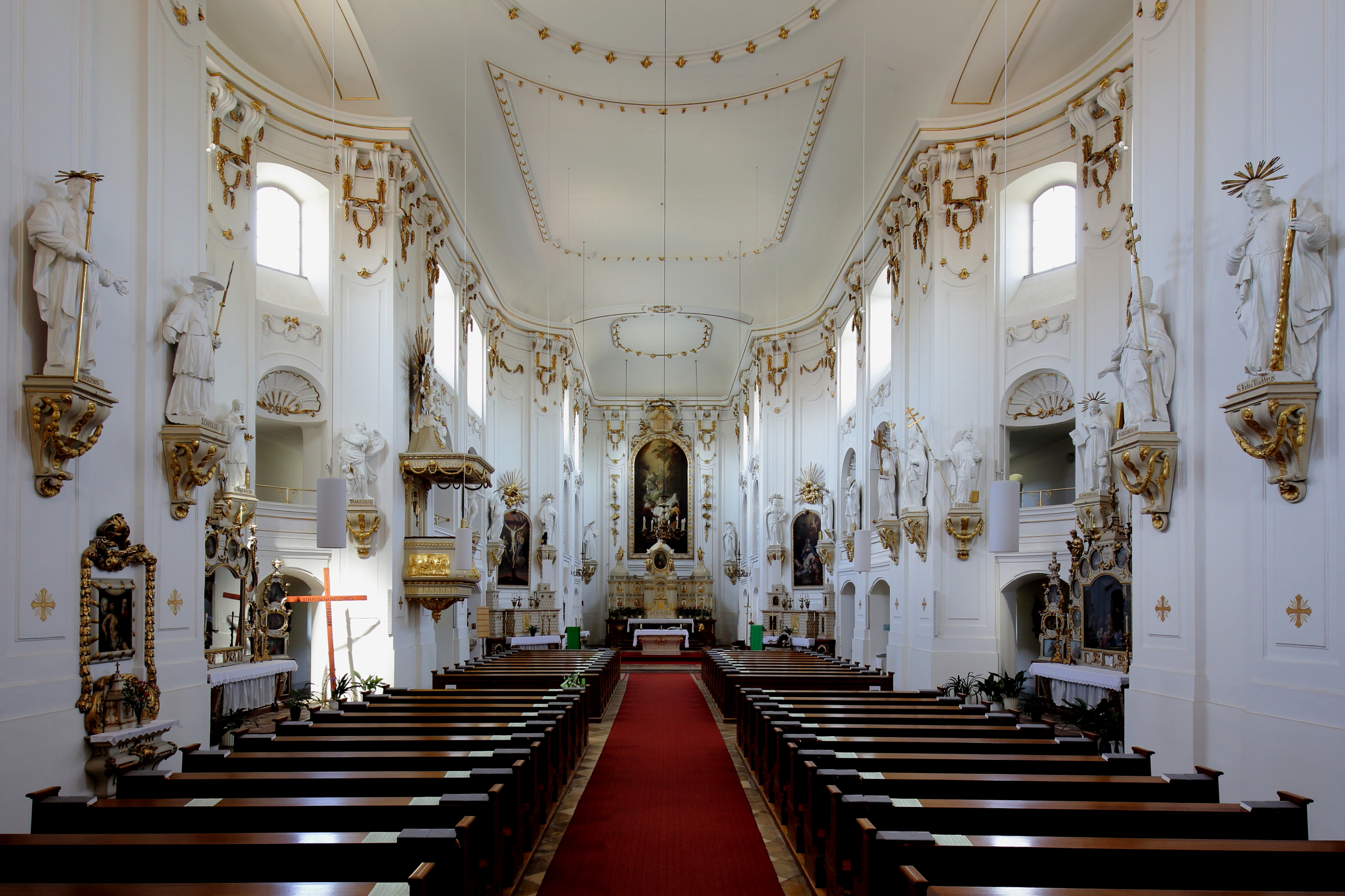 Innenansicht der röm.-kath. Pfarrkirche Mariä Geburt am Rennweg im 3. Wiener Gemeindebezirk Landstraße.Sie wurde 1768 nach Plänen des Architekten Thaddäus Karner als Waisenhauskirche errichtet. Der Innenraum ist in Weiß-Gold gehalten und besitzt ein bemerkenswertes einheitliches barock-klassizistisches Aussehen, das von 1770 bis 1776 entstand.